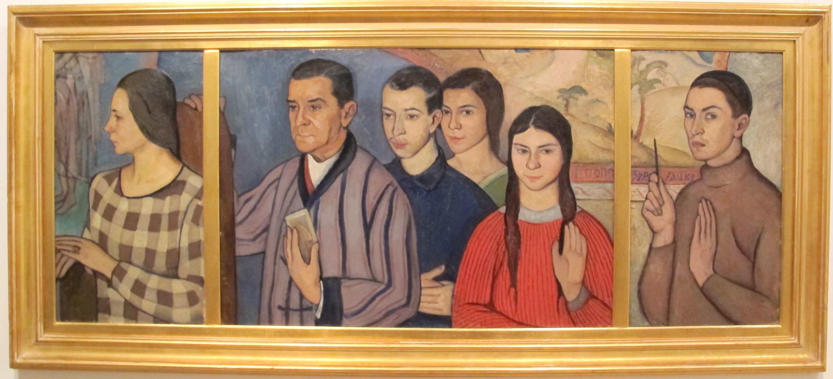 Sabin popp, trittico, ritratto di famiglia, 1927